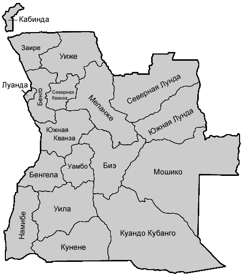 провинции Анголы